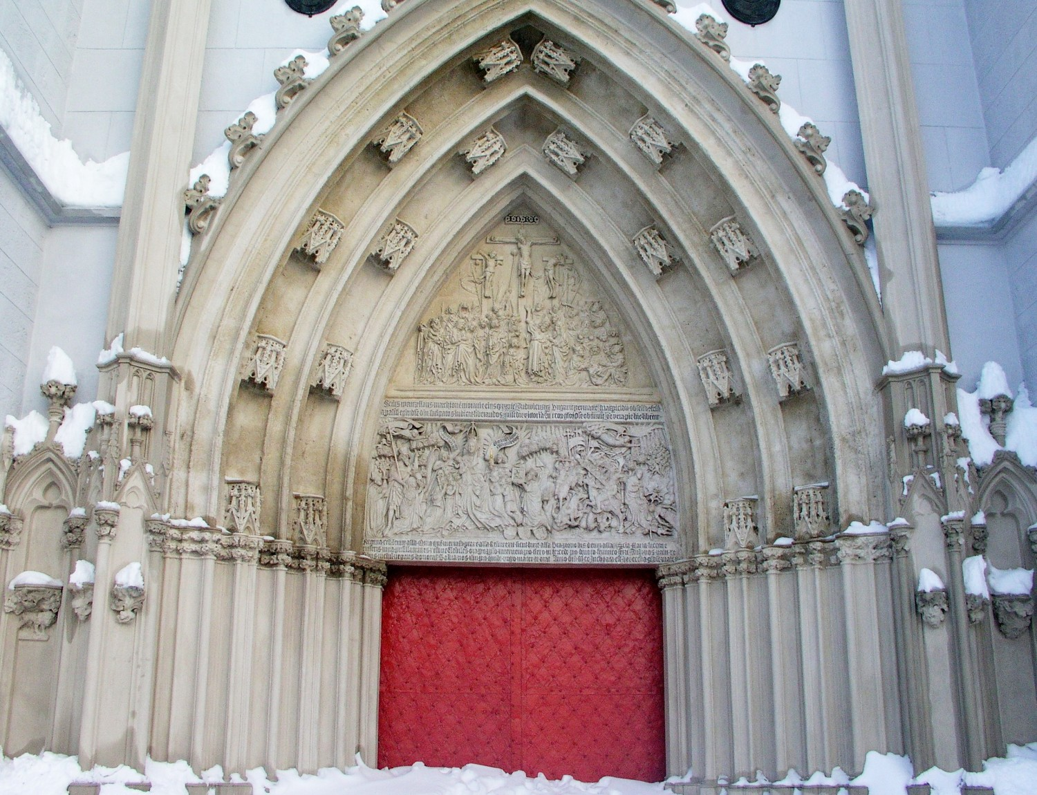 Description: Gothic main entrance of Mariazell basilica, Styria - Gotisches Hauptportal der Basilika von Mariazell, Steiermark own image - eigene Aufnahme, Jan. 05, 2006 Photographer: Martin Ortner, Vienna, Austria